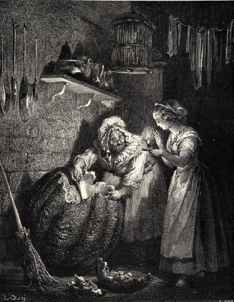 Illustration for Charles Perrault's Cinderella from Histoires ou Contes du Temps passé: Les Contes de ma Mère l'Oye(1697). Gustave Doré's illustrations appear in an 1867 edition entitled Les Contes de Perrault. First of three engravings